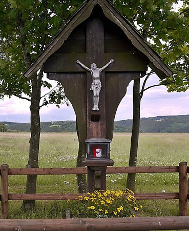 Tschernobyl-Kreuz